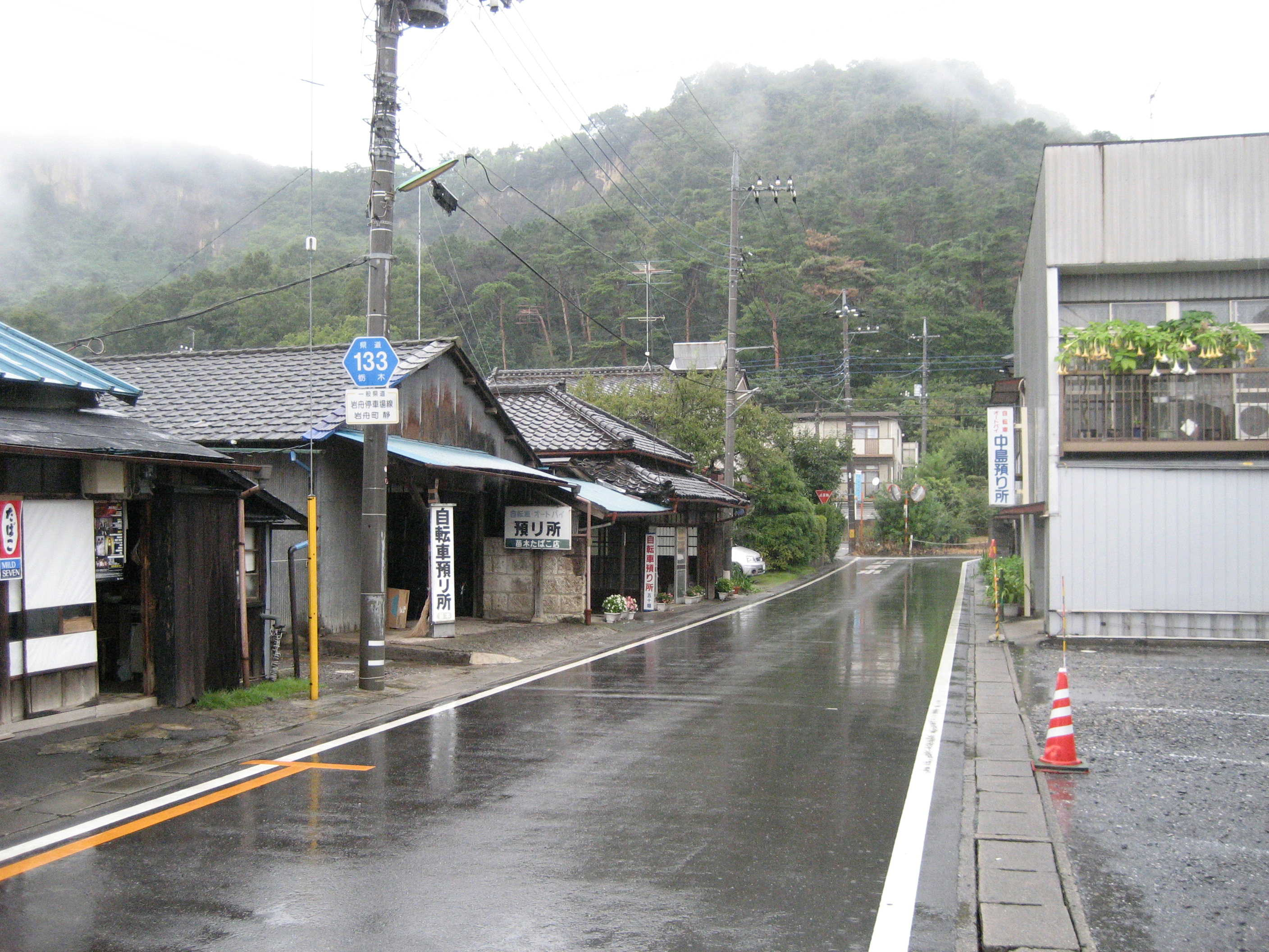 栃木県道133号線岩舟駅前